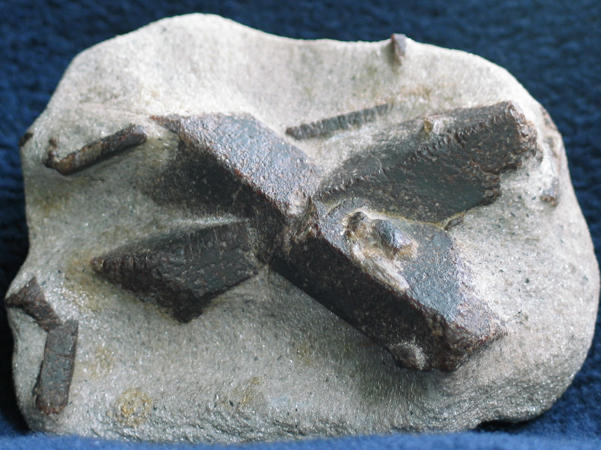 Staurolit z Półwyspu Kola w Rosji